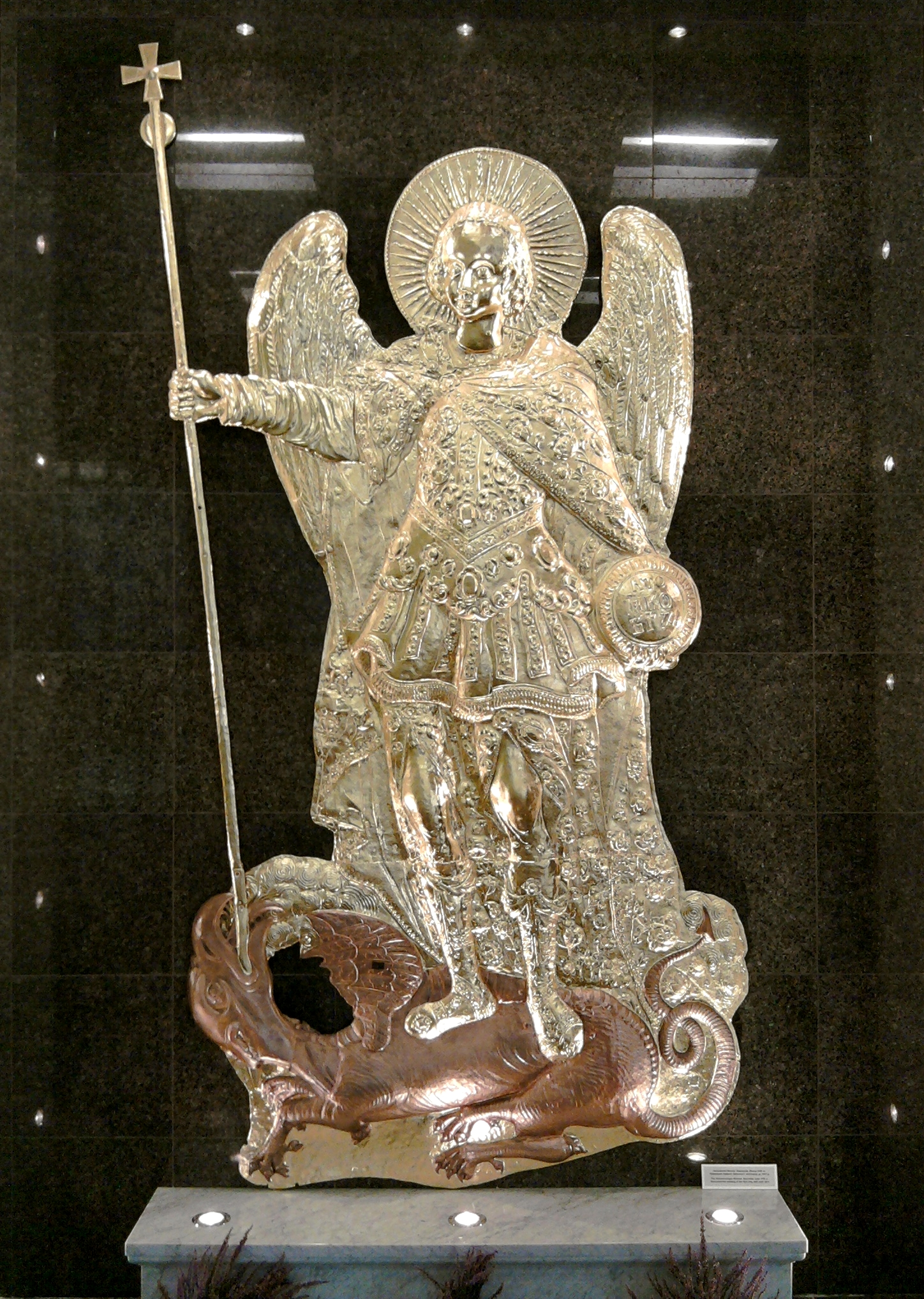 Святой Архангел Михаил